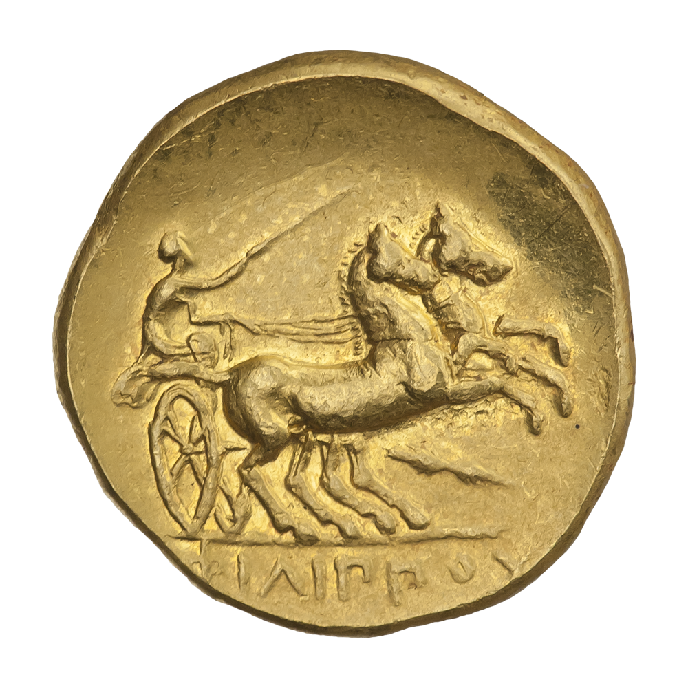 Македонское царство. Пелла. Филипп II (359—336 гг. до н.э.). Статер. Чеканка после 328 г. до н.э. Реверс. Бига с возничим, вправо; под передними ногами коней молнии. В обрезе надпись ФIΛIППOY.